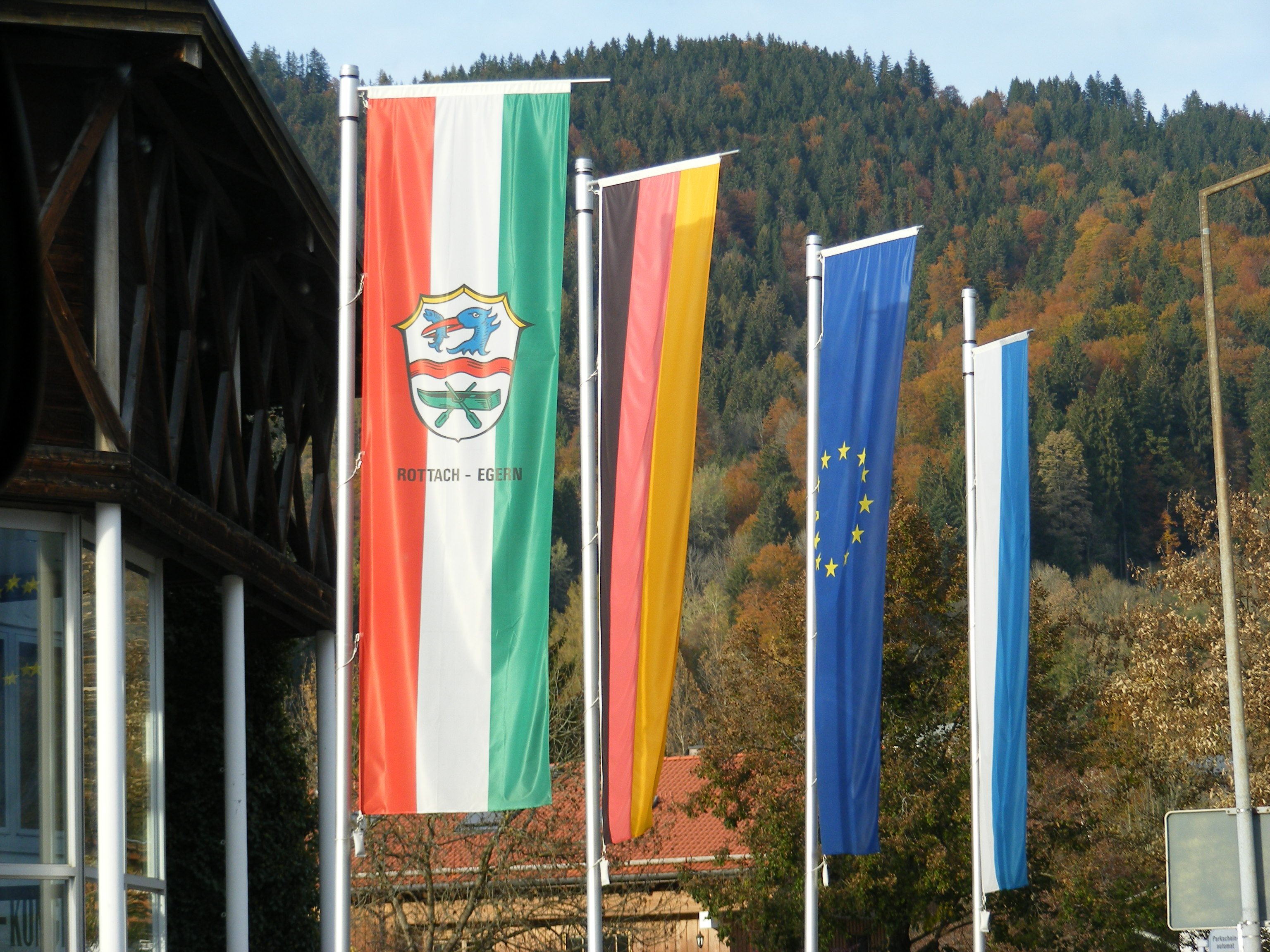 Germany